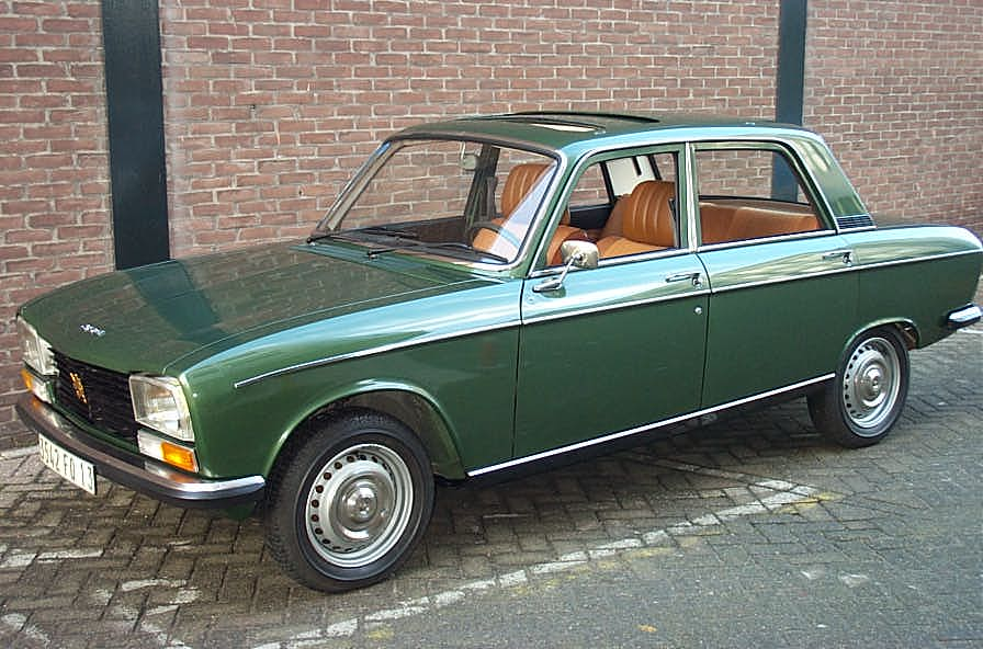 Peugeot 304 S 1974